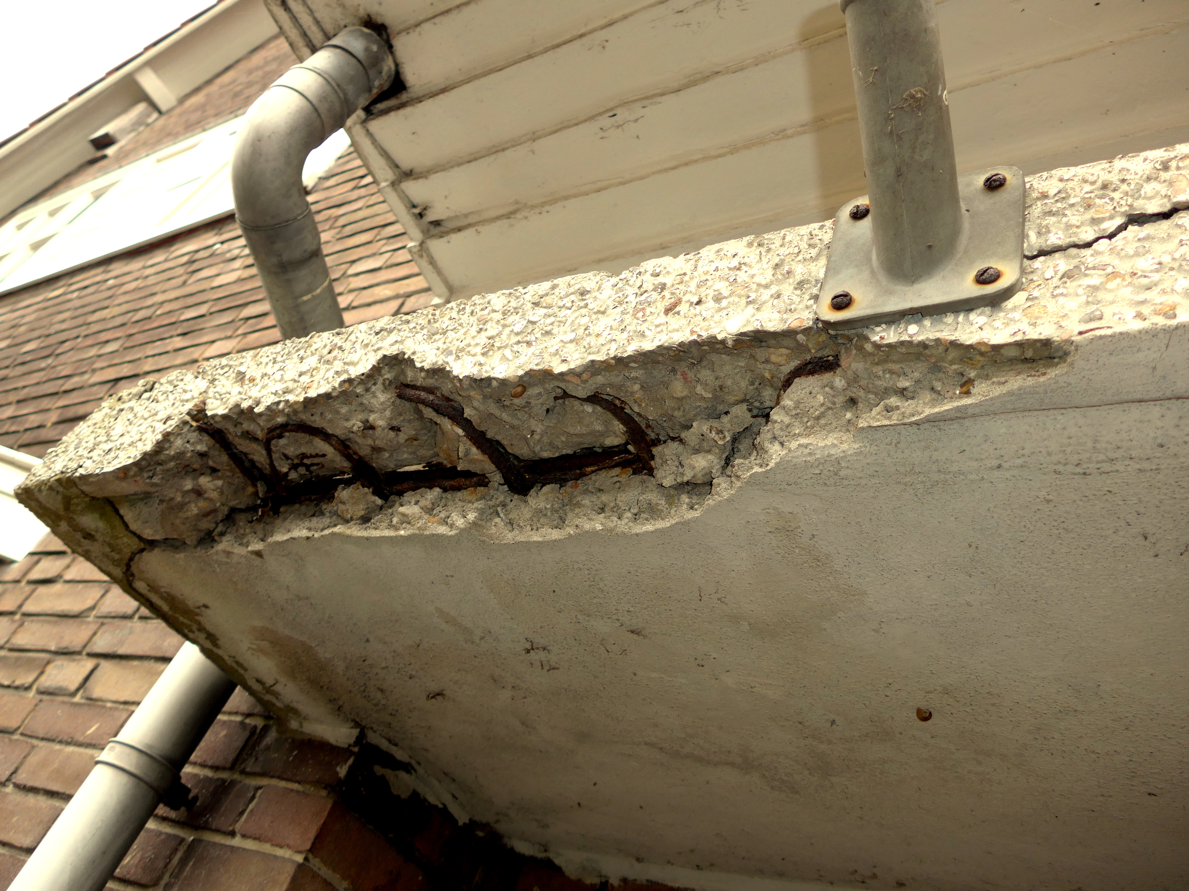 Betonrot